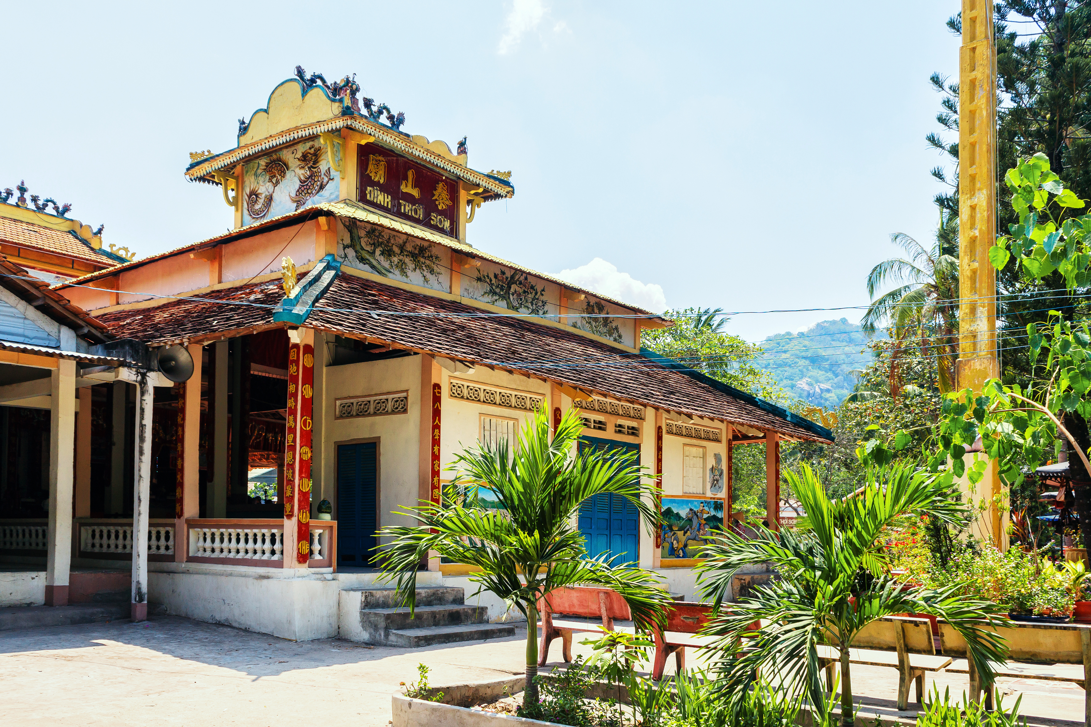 Đình Thới Sơn tọa lạc gần chân núi Két, thuộc xã Thới Sơn, huyện Tịnh Biên, tỉnh An Giang. Đây là một ngôi đình thờ thần Thành hoàng của làng Xuân Sơn và Hưng Thới xưa (sau ghép lại là Thới Sơn), và là một di tích lịch sử cách mạng Việt Nam